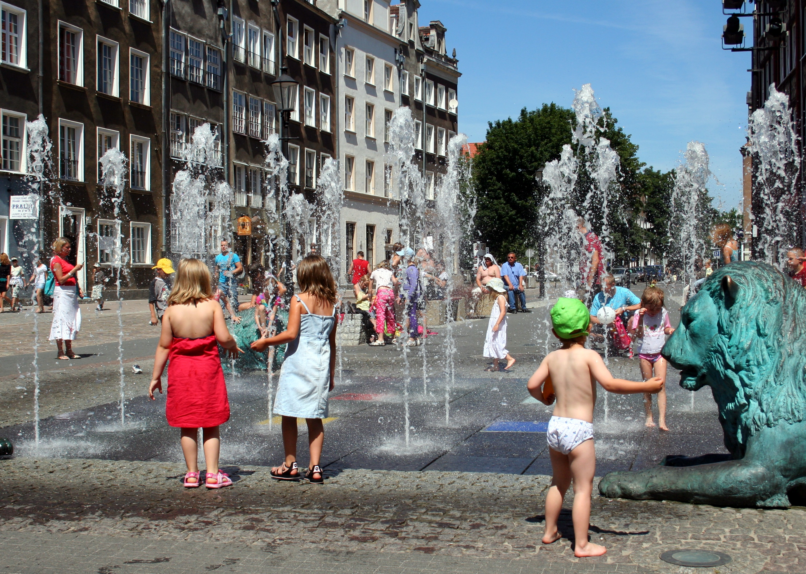 Fontanna na skrzyżowaniu ulic Św. Ducha i Grobli I w Gdańsku.